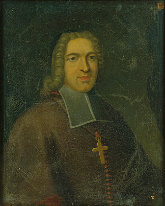 Ritratto di Jean-Baptiste de Brancas